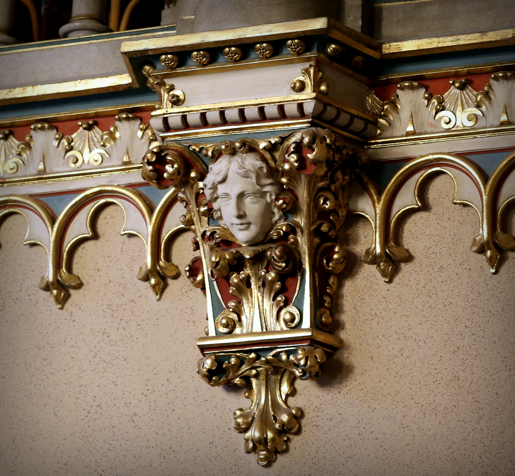 Pázmány Péter Katolikus Egyetem Jog- és Államtudományi Kar díszterem részlet. - Budapest VIII. kerület, Szentkirályi utca 28-30. szám